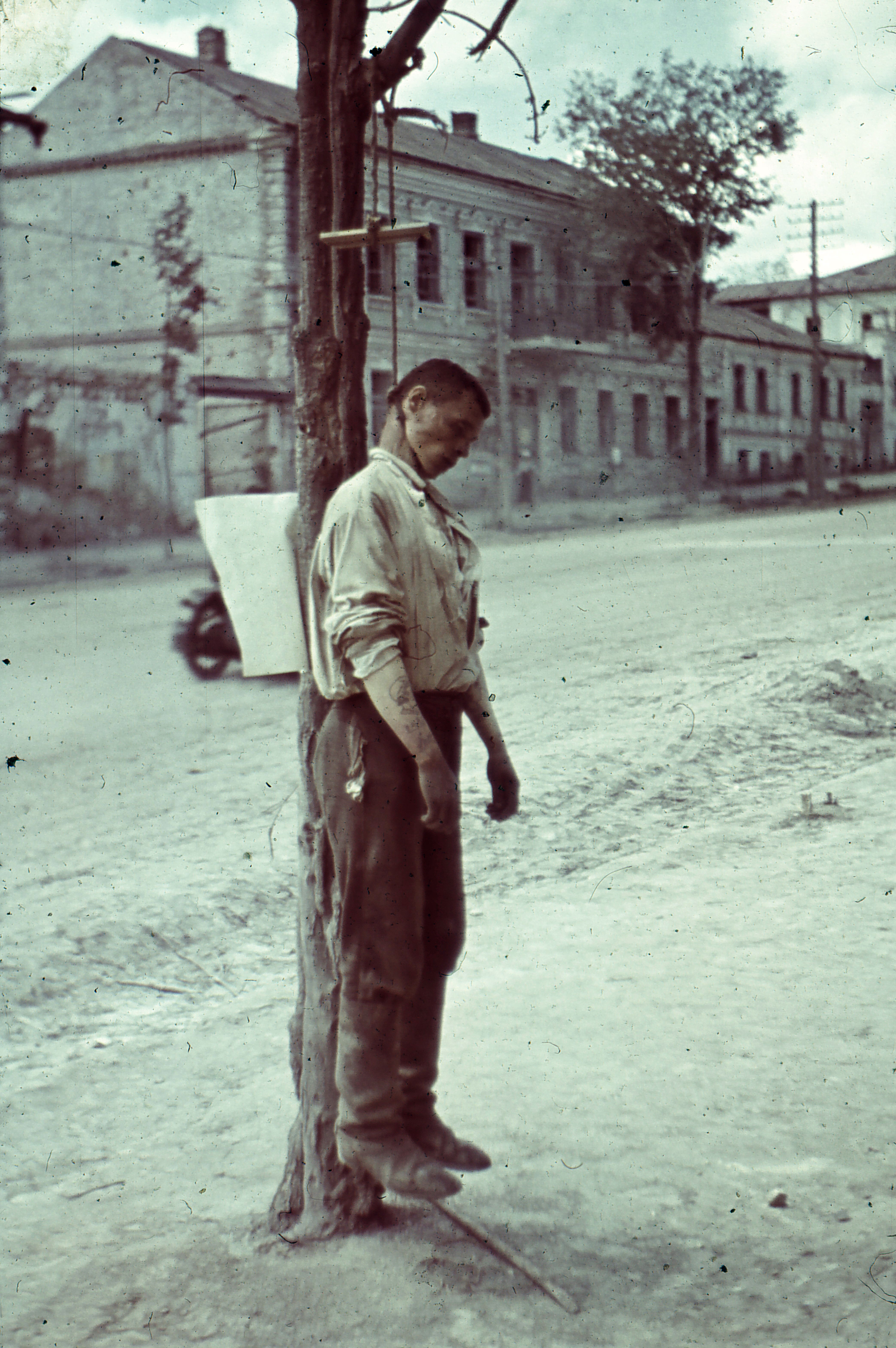 Lenin utca és Komszomol utca sarok. Location: Russia, Stary Oskol Tags: corpse, colorful, second World War Title: Lenin utca és Komszomol utca sarok.